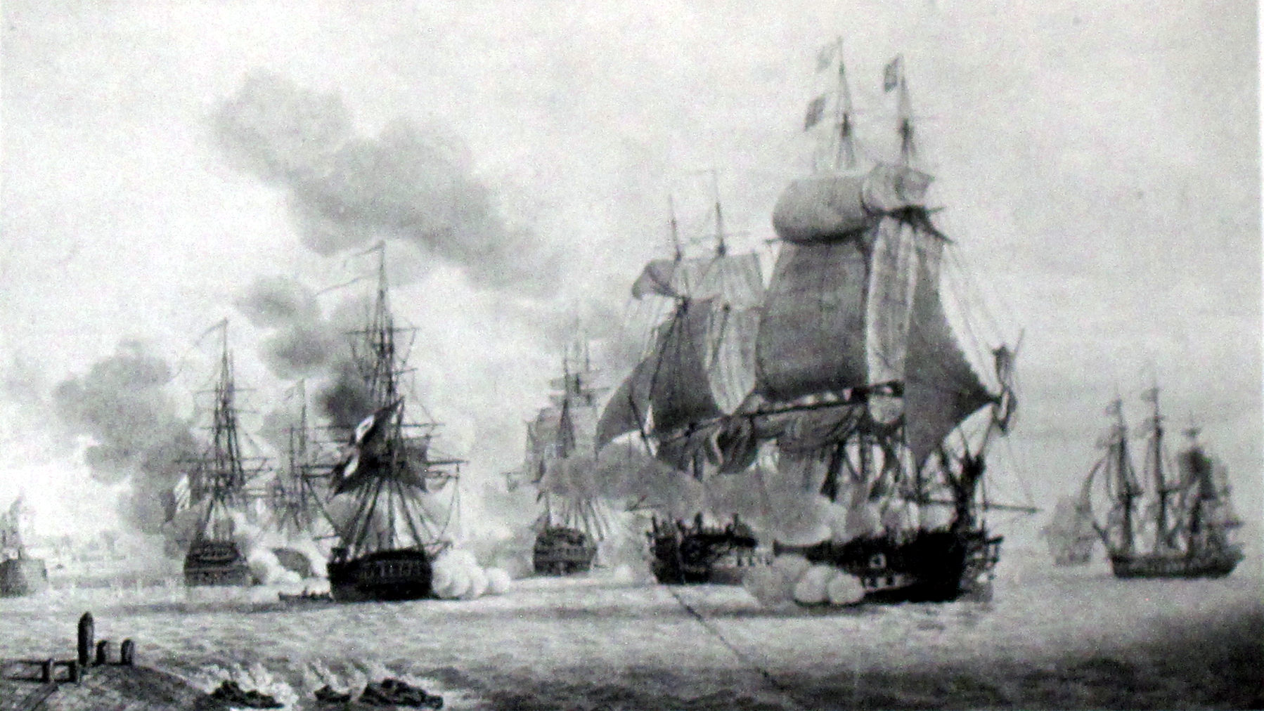 Battle of Les Sables-d'Olonne